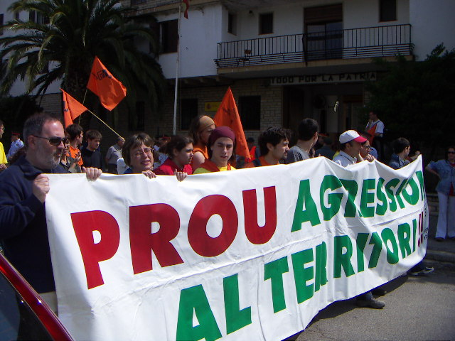 Manifestació convocada per Salvem l'Empordà